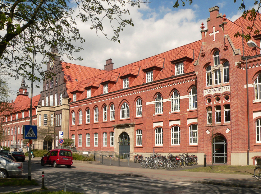 Annastift